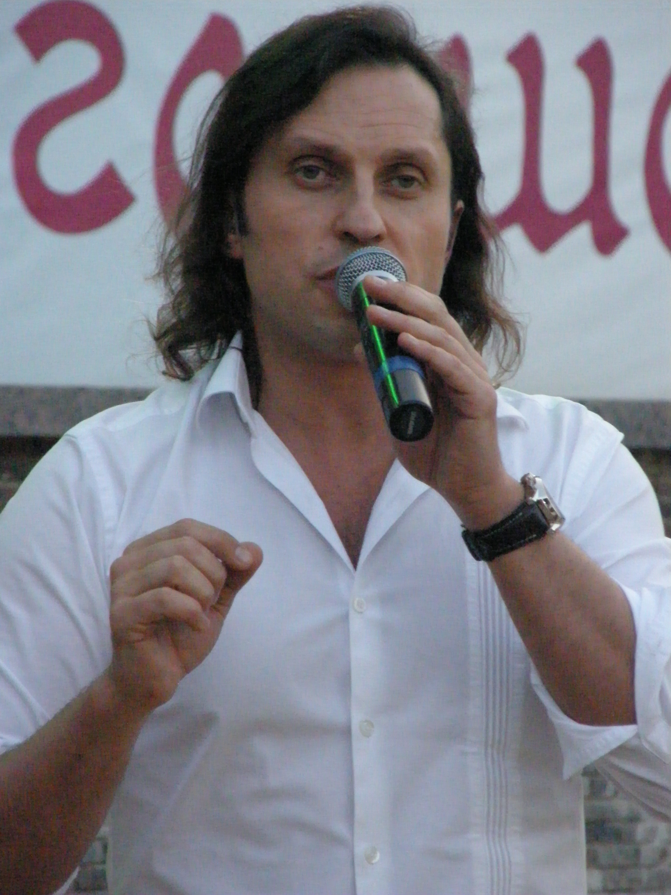 Концерт в парке Щербакова (Донецк) 6 июня 2010 года. Ведущий концерта Александр Ревва.